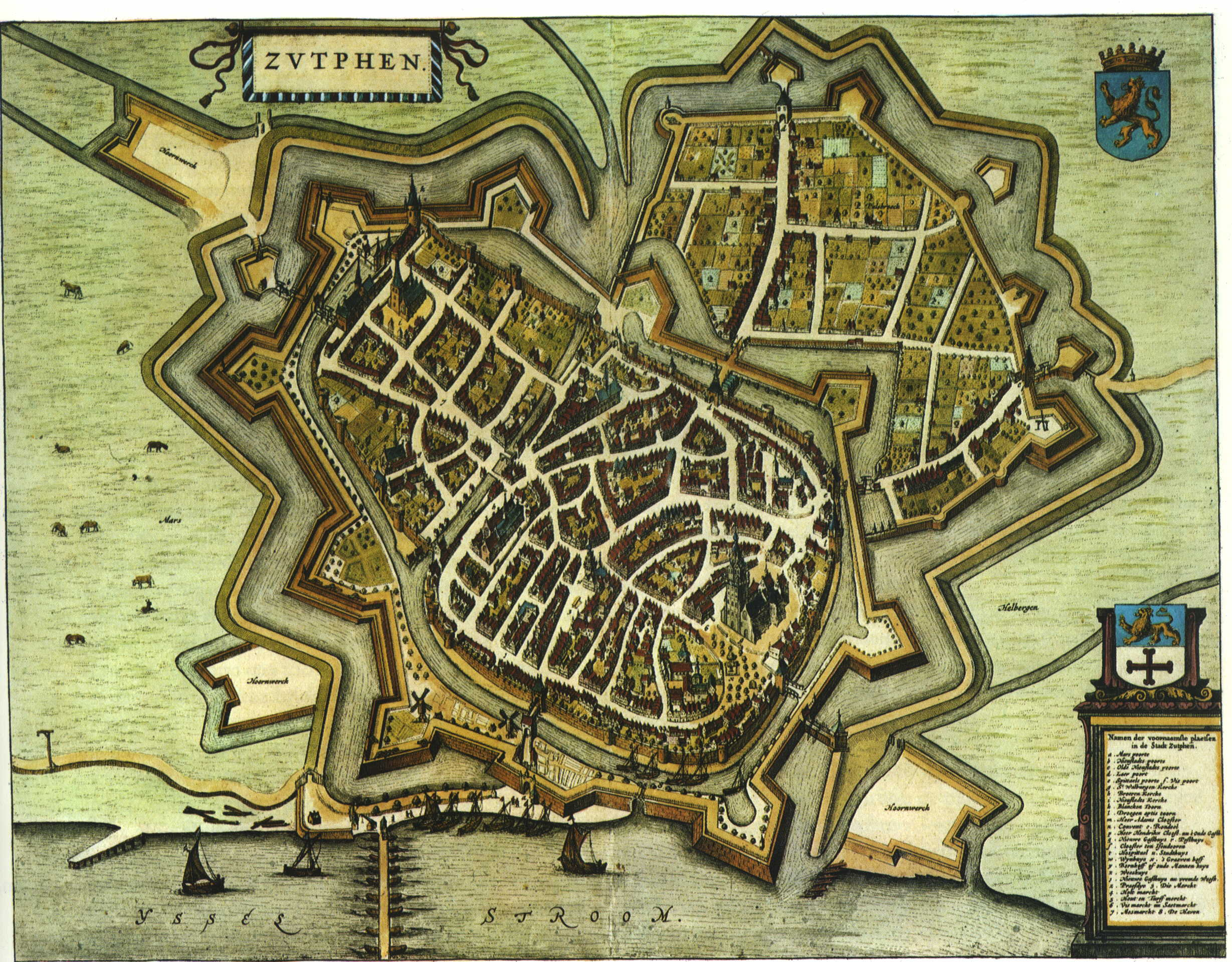 title=Zutphen;size=39 x 50 cm